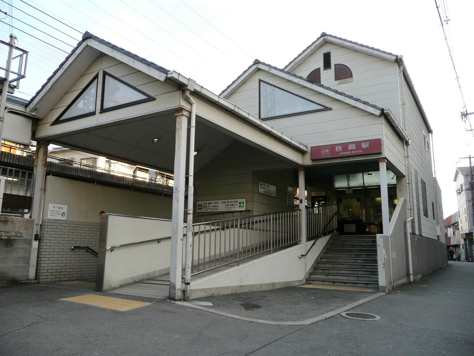 Kinki Nippon Railway,Nara Line,Hiraoka Station. /近鉄奈良線駅枚岡駅近鉄難波方面駅舎